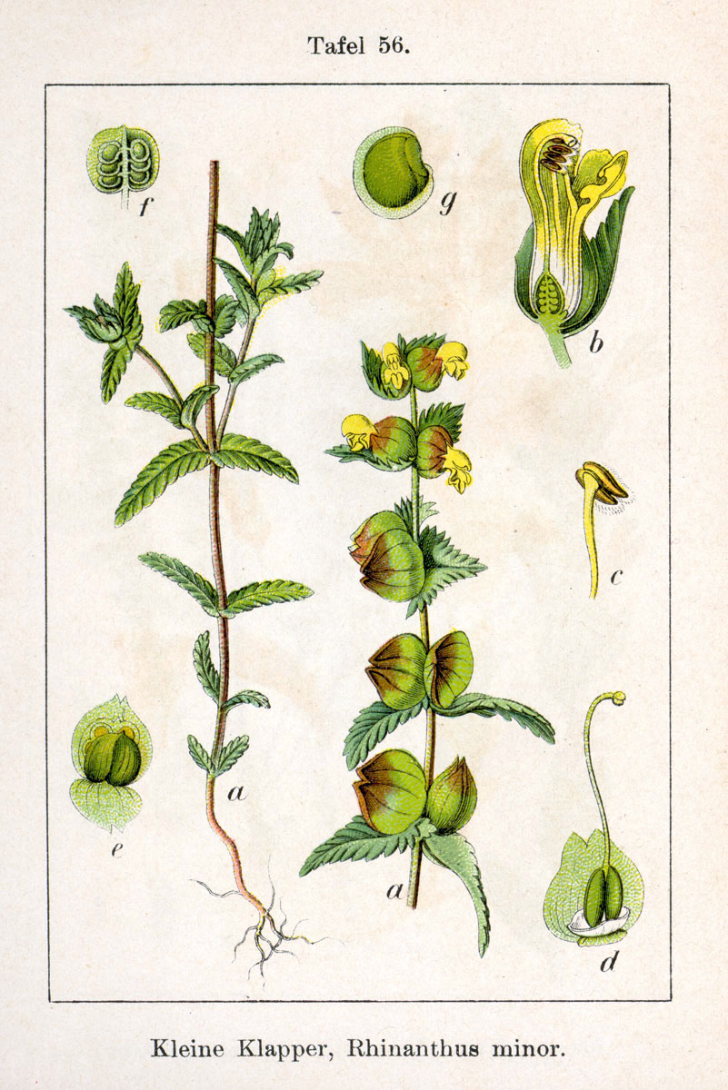 Rhinanthus minor L. Original Description Kleine Klapper, Rhinanthus minor